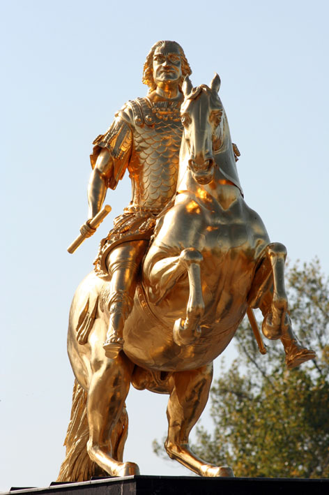 Goldener Reiter in Dresden